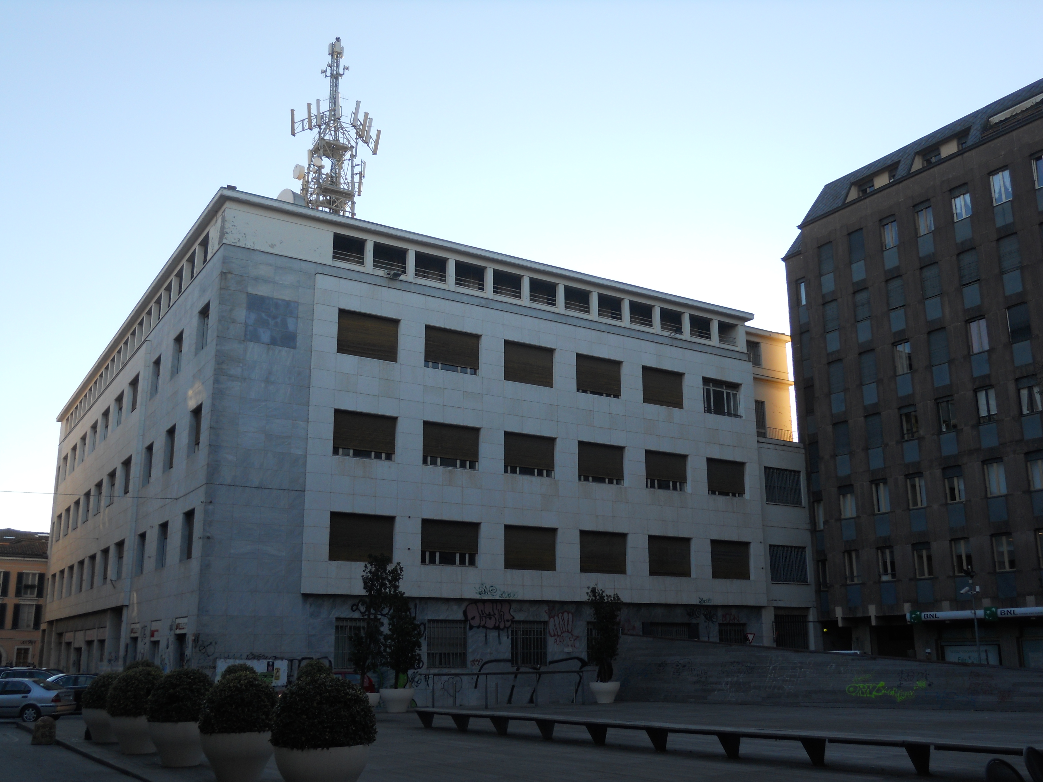 Palazzo uffici della stipel (Brescia)